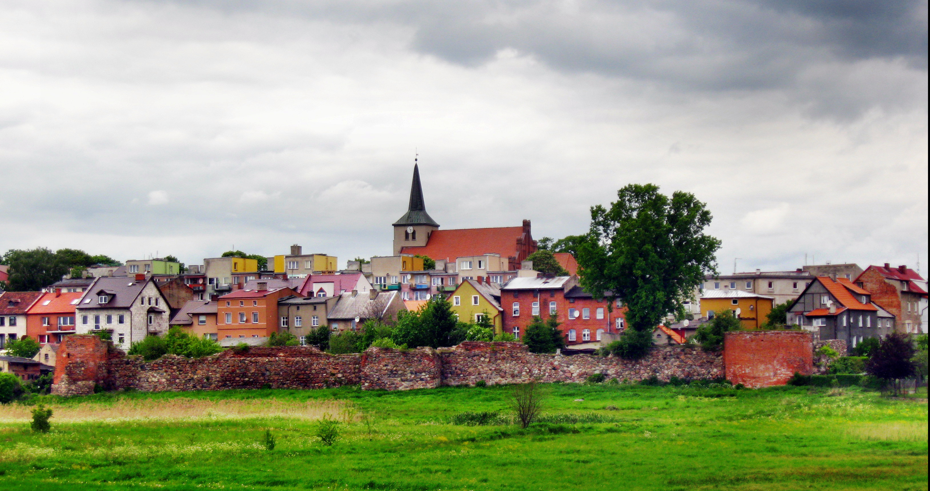 w tle widoczny kościół p.w. św. Michała Archanioła